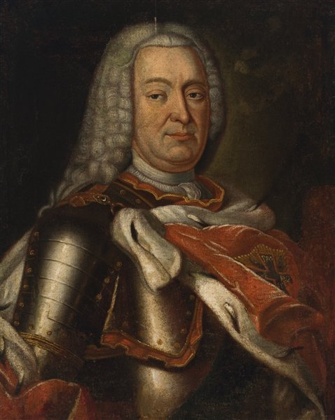 Беларуская (тарашкевіца): Рафал Яленскі